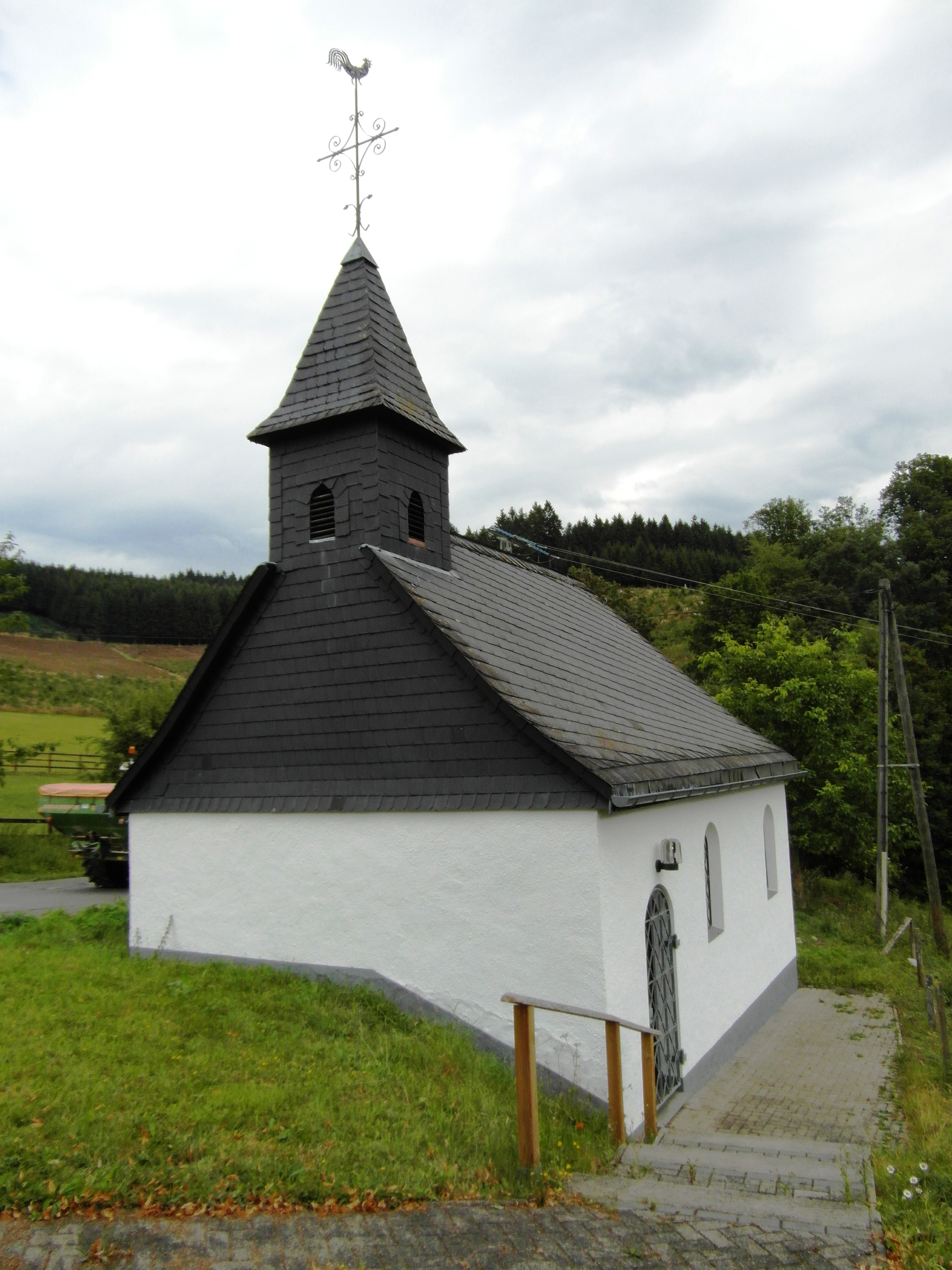 denkmalgeschützte Kapelle in Bausenrode, errichtet um 1300